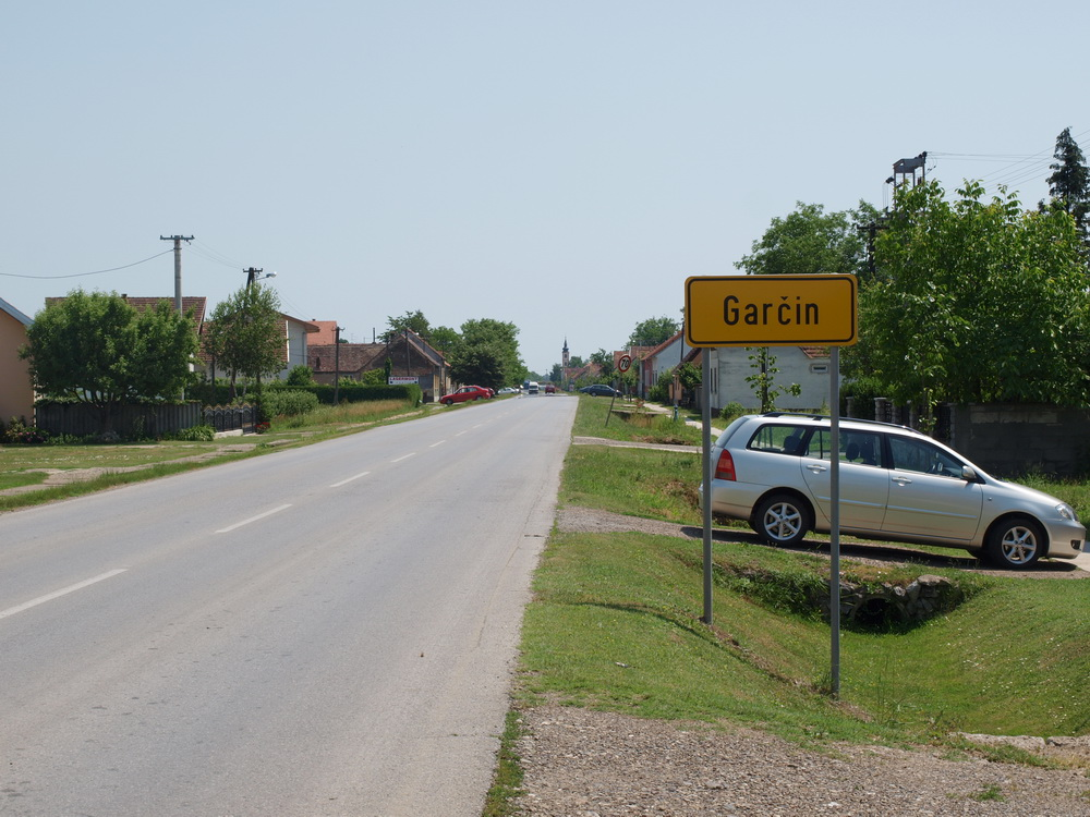 Ulaz u selo Garčin, Brodsko-posavska županija.